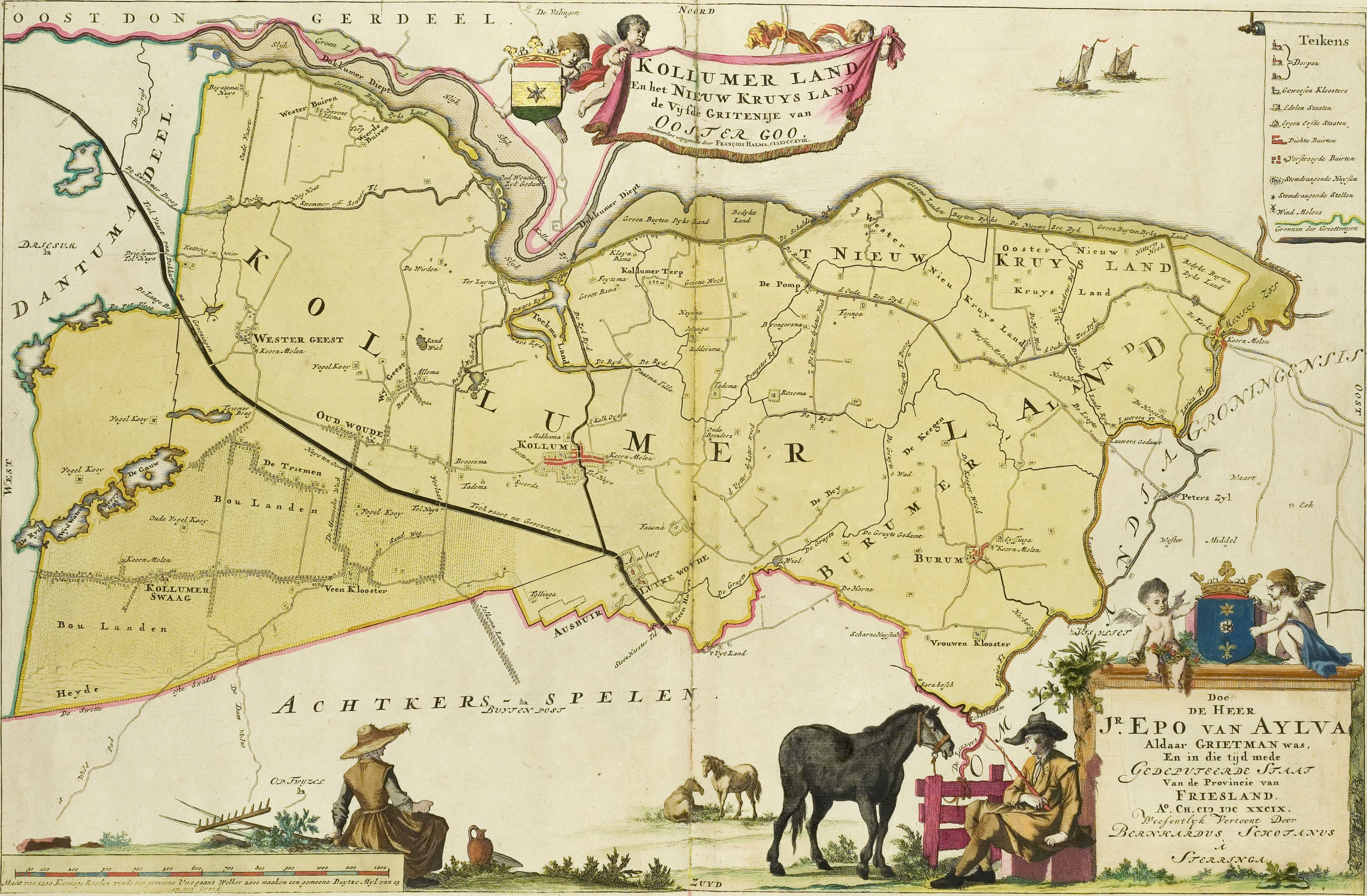 Kaart van de grieternij Kollumerland in de atlas van Bernardus Schotanus à Sterringa (ca. 1639-1704), die postuum werd gepubliceerd in 1718.